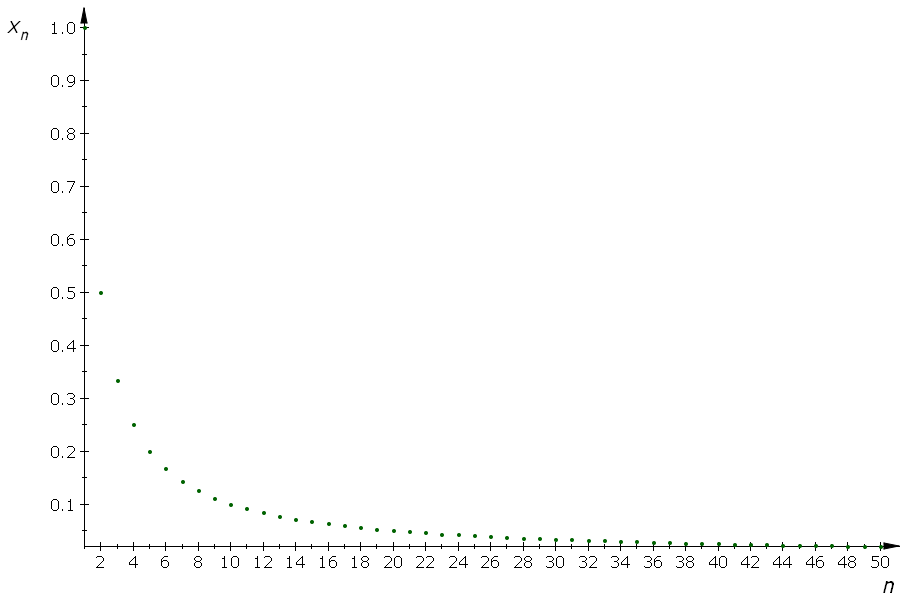 Plot af følgen xn lig 1/n